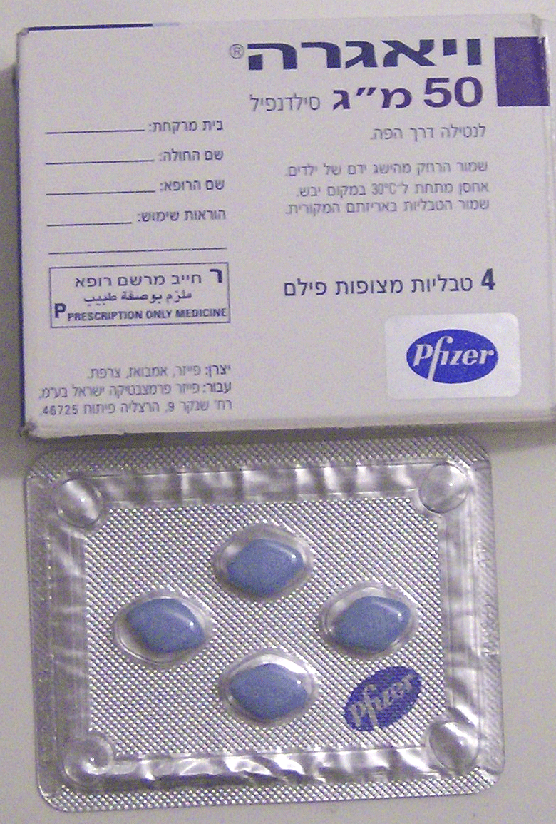 חפיסת טבליות ויאגרה רישיון נוצר על ידי משתמש:Itayba